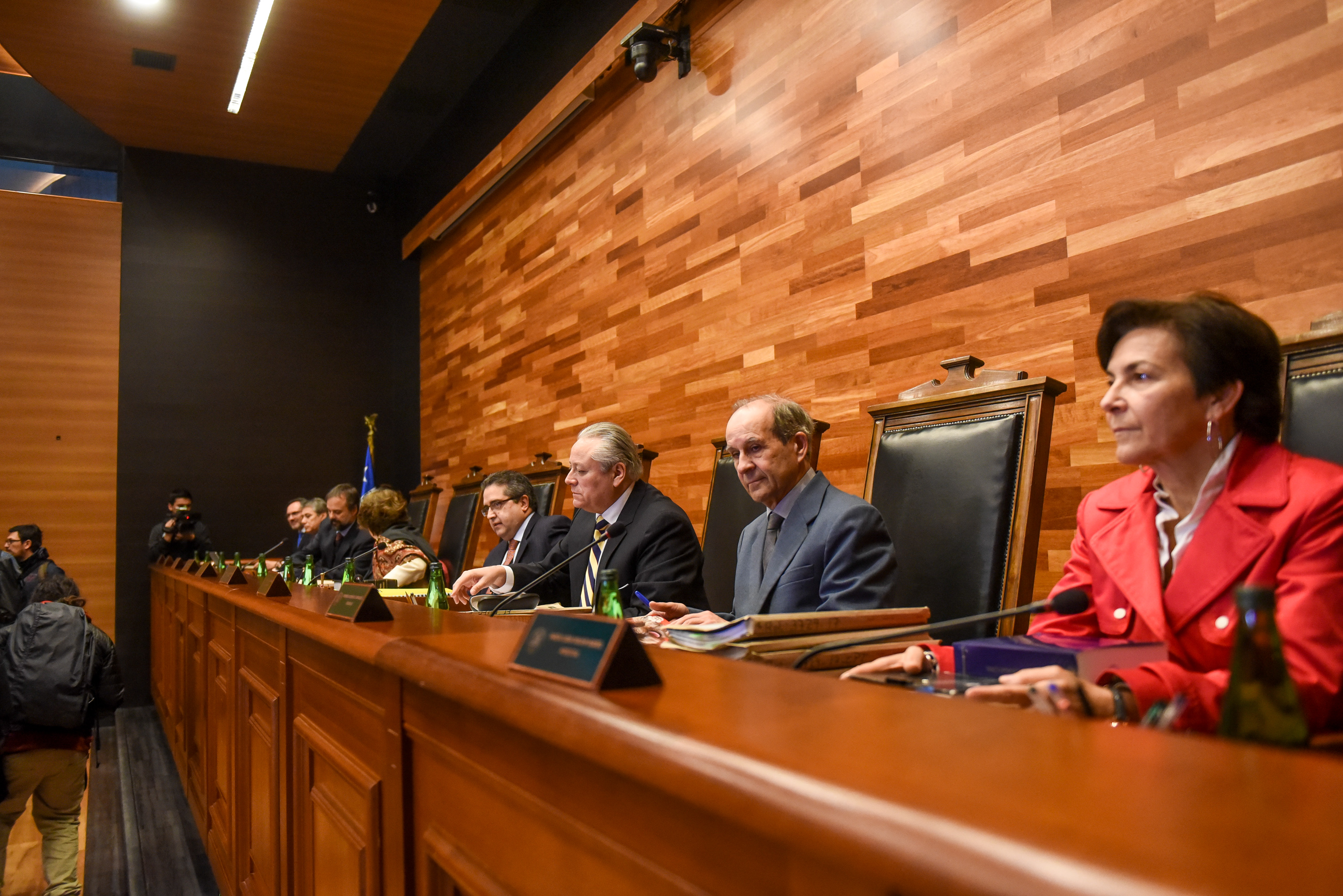 Ministra Paula Narváez junto a las Ministras Pascual y Castillo, asisten al Tribunal Constitucional para escuchar alegatos en defensa del proyecto que despenaliza la interrupción voluntaria del embarazo en 3 causales.